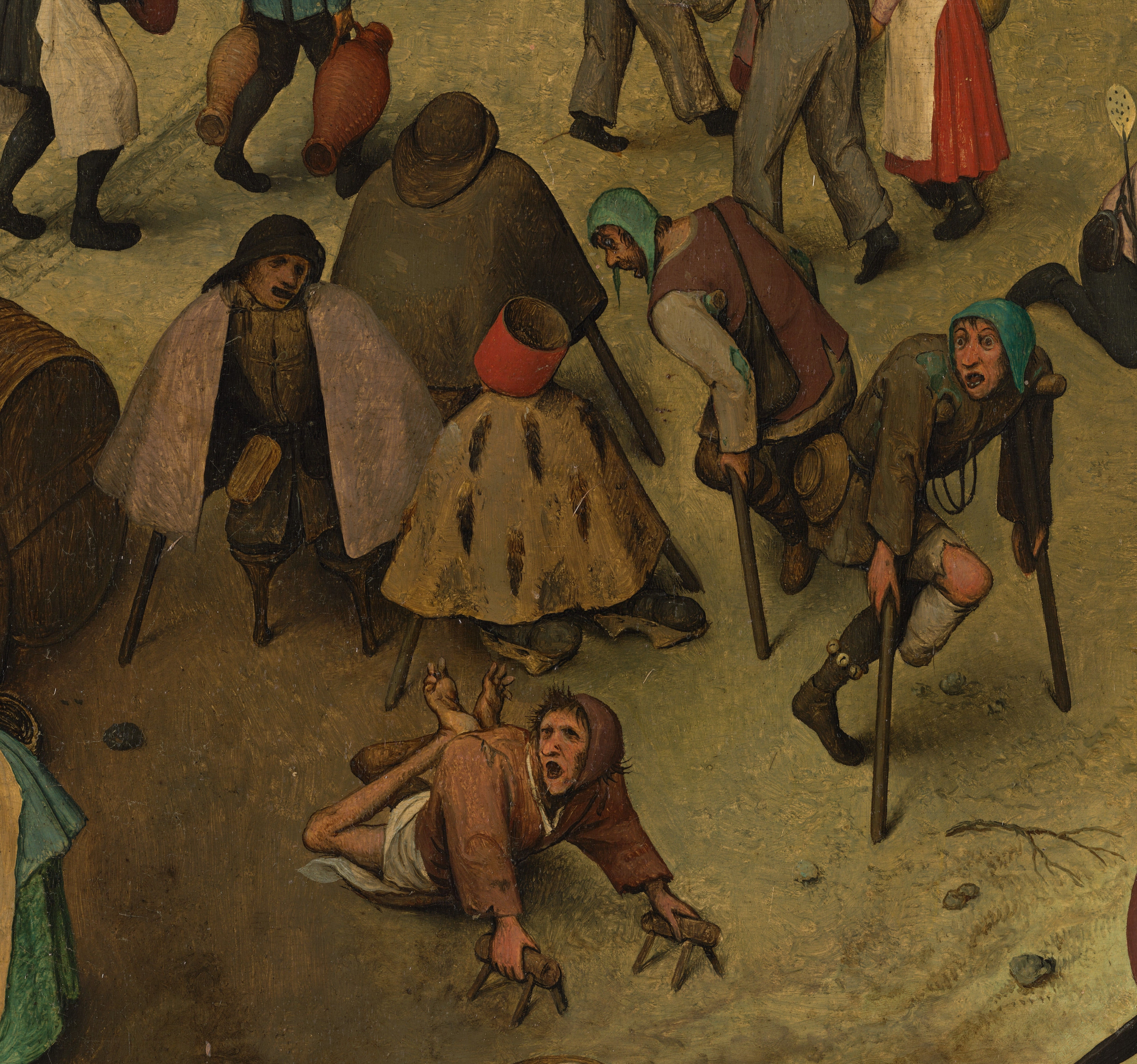 Detail uit "De strijd tussen Vasten en Vastenavond"